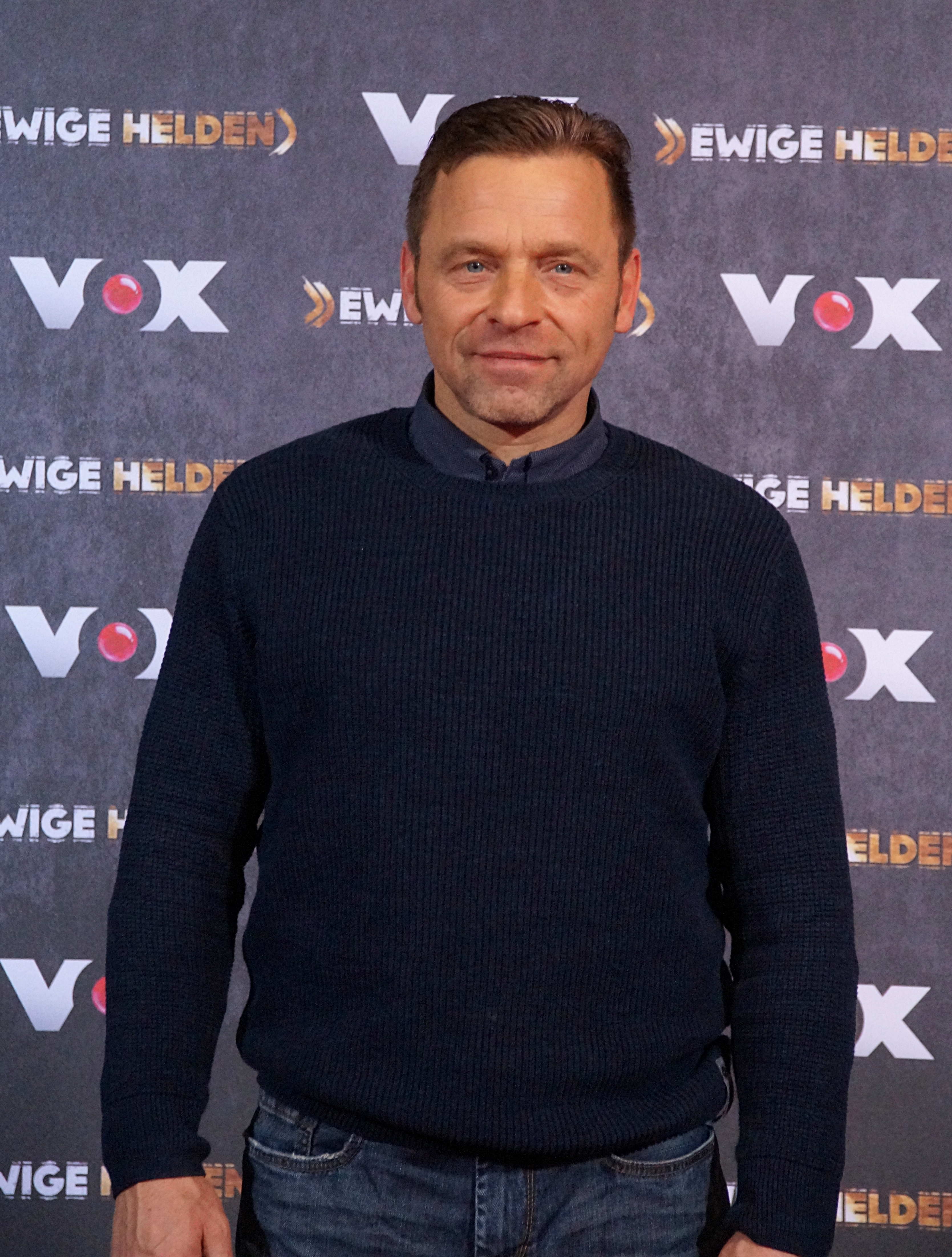 Thomas Häßler beim VOX "Ewige Helden" Pressetermin, im Dezember 2015.